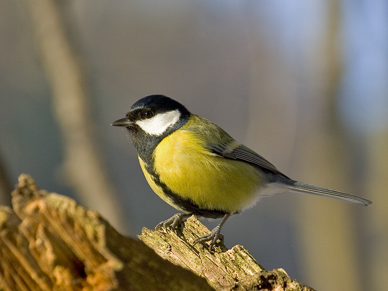 Parus major, Poland